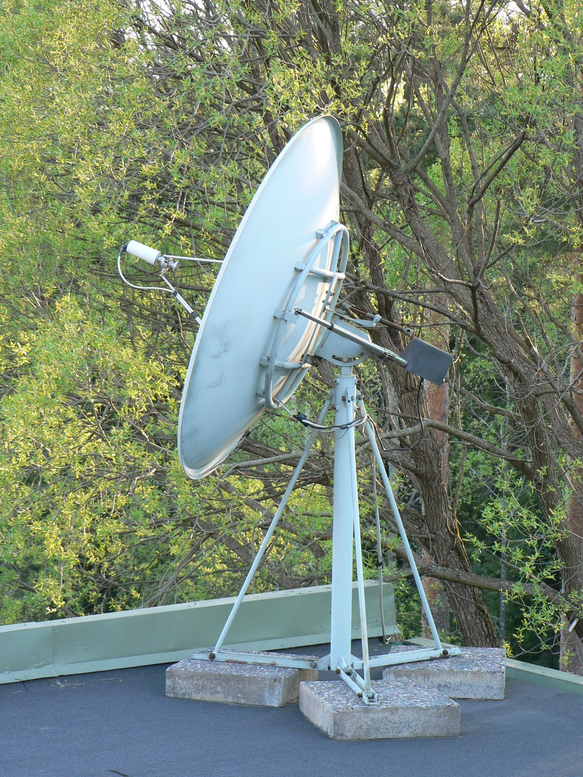 Motorised satellite dish